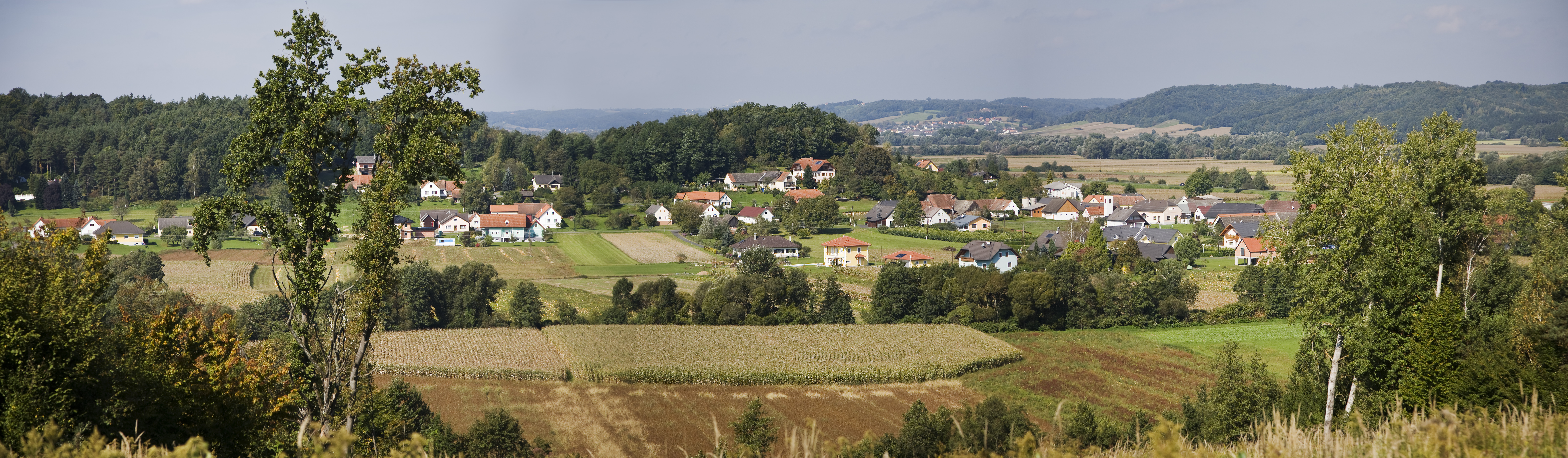 Blick auf die Ortschaft Doiber von Osten